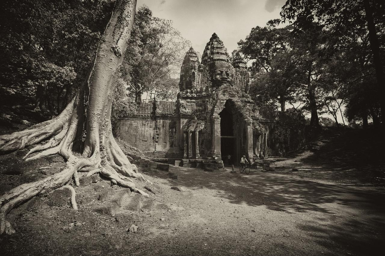 Vietnam & Cambodia